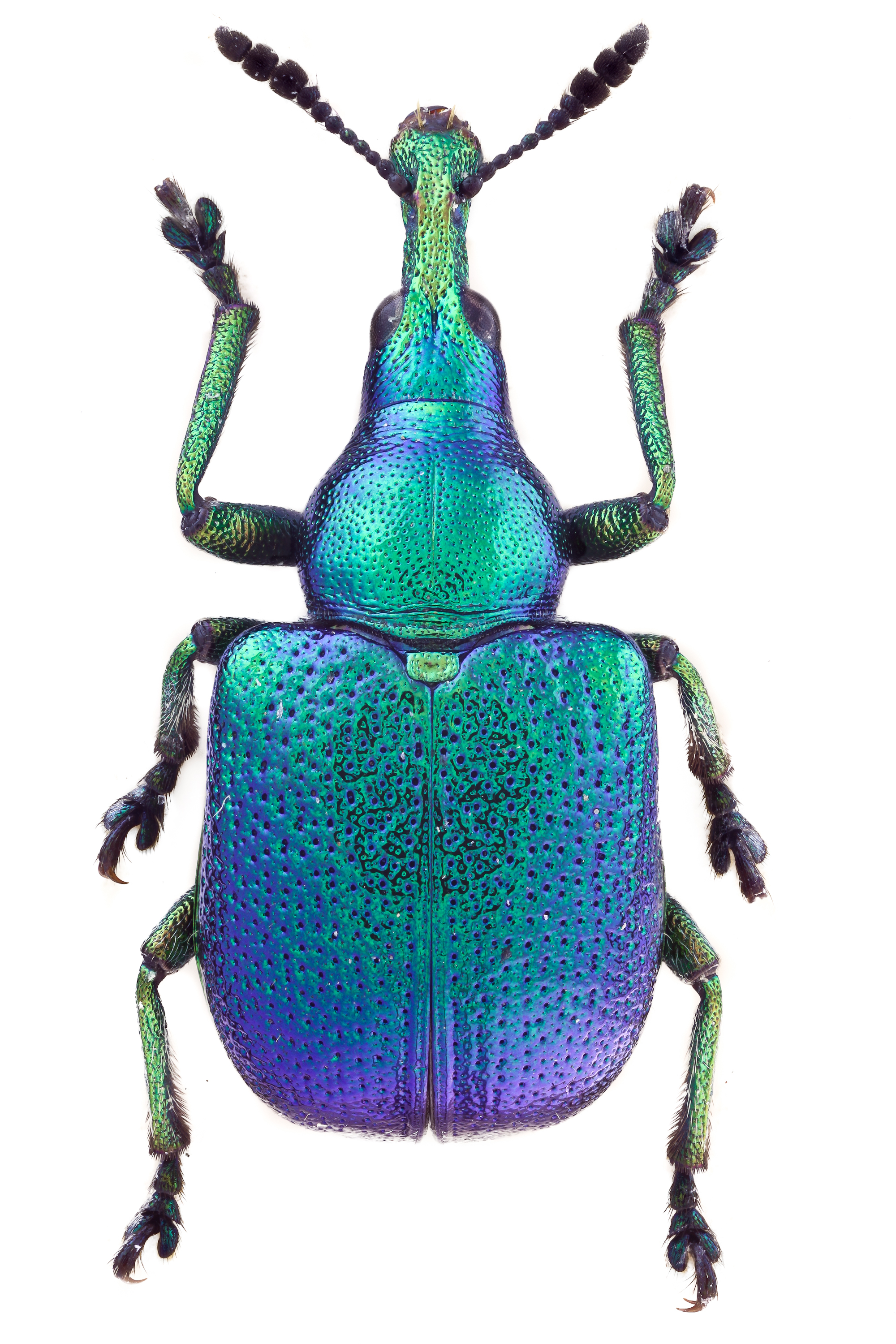 Byctiscus populi, female